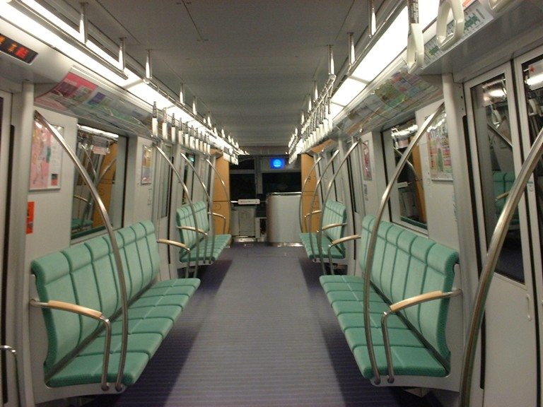 福岡市交通局3000系 車内（先頭車輌） 七隈線 次郎丸→橋本にて 2005年4月6日 Bakkai撮影 Category:鉄道列車内部画像 Category:福岡市交通局の画像